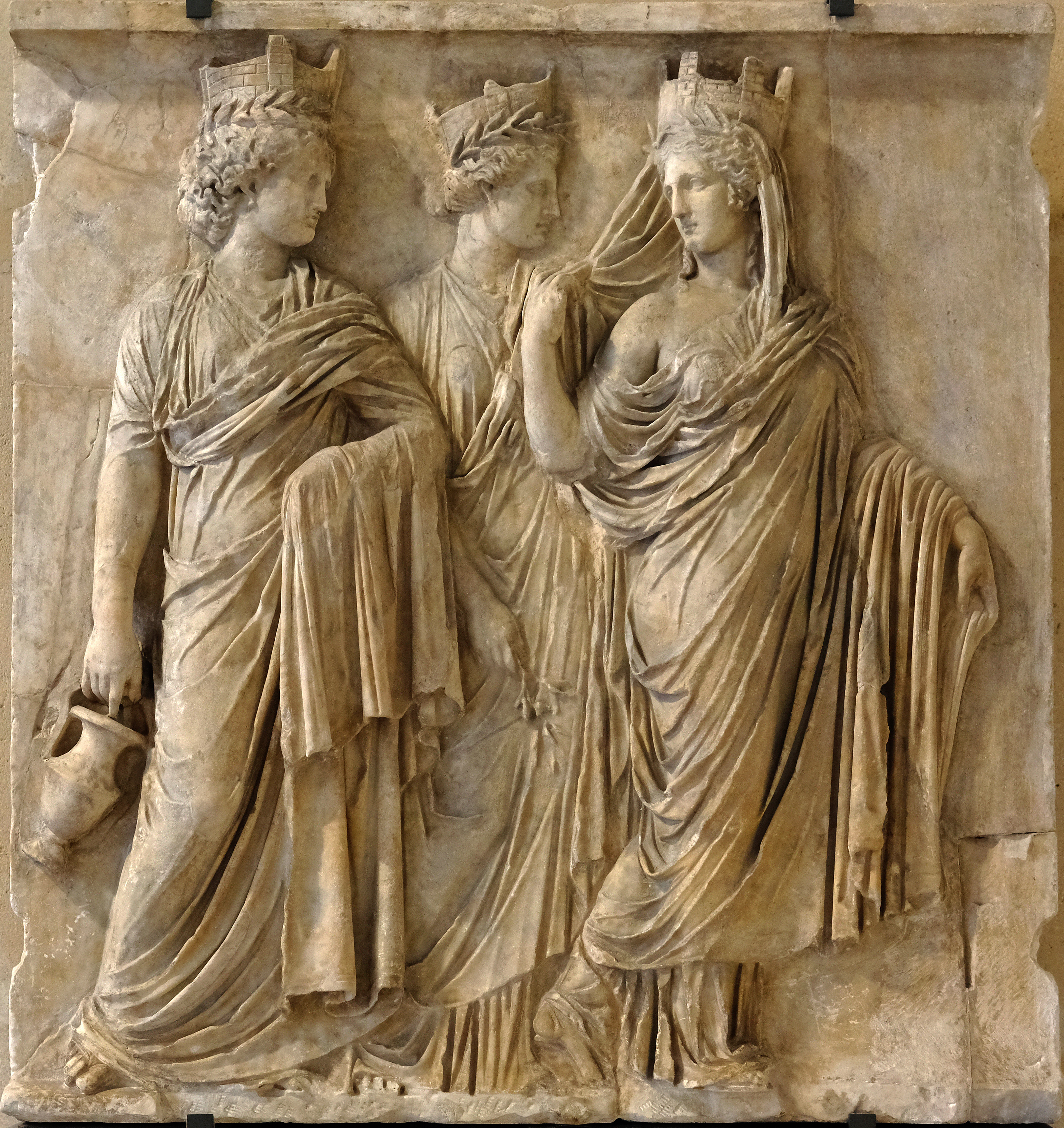 label QS:Lfr,"Relief, dit Les Trois Tychés"